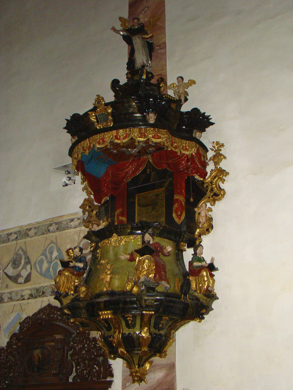 Dominikanerkirche Bad Wimpfen, Kanzel